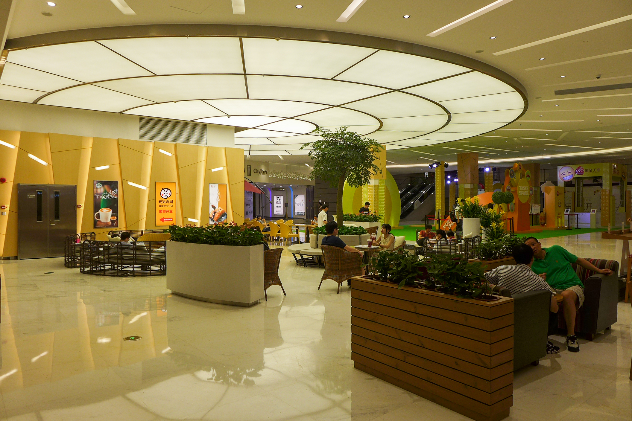 Guangzhou IFC Basement Arcade